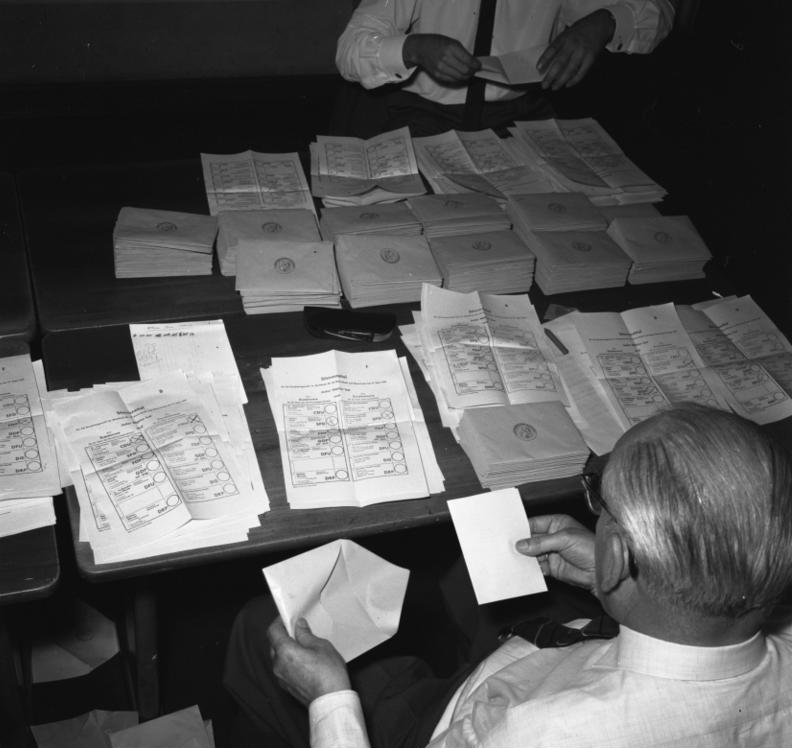 Bundestagswahl: Stimmauszählung im Stimmbezirk 63 Ernst-Moritz-Arndt-Schule